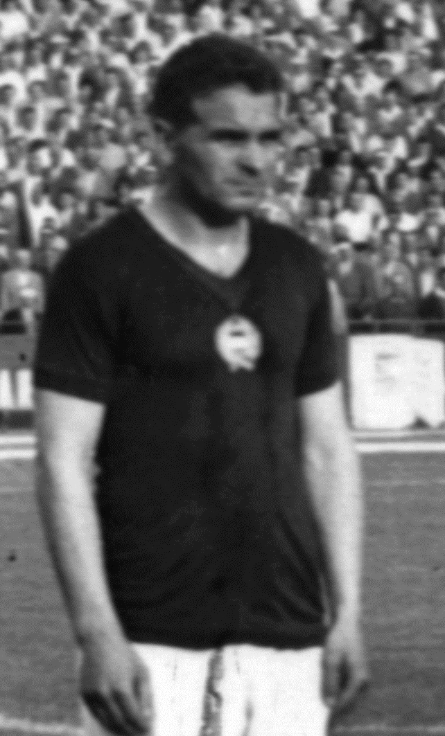 Dalnoki Jenő magyar olimpiai bajnok labdarúgó, labdarúgóedző.